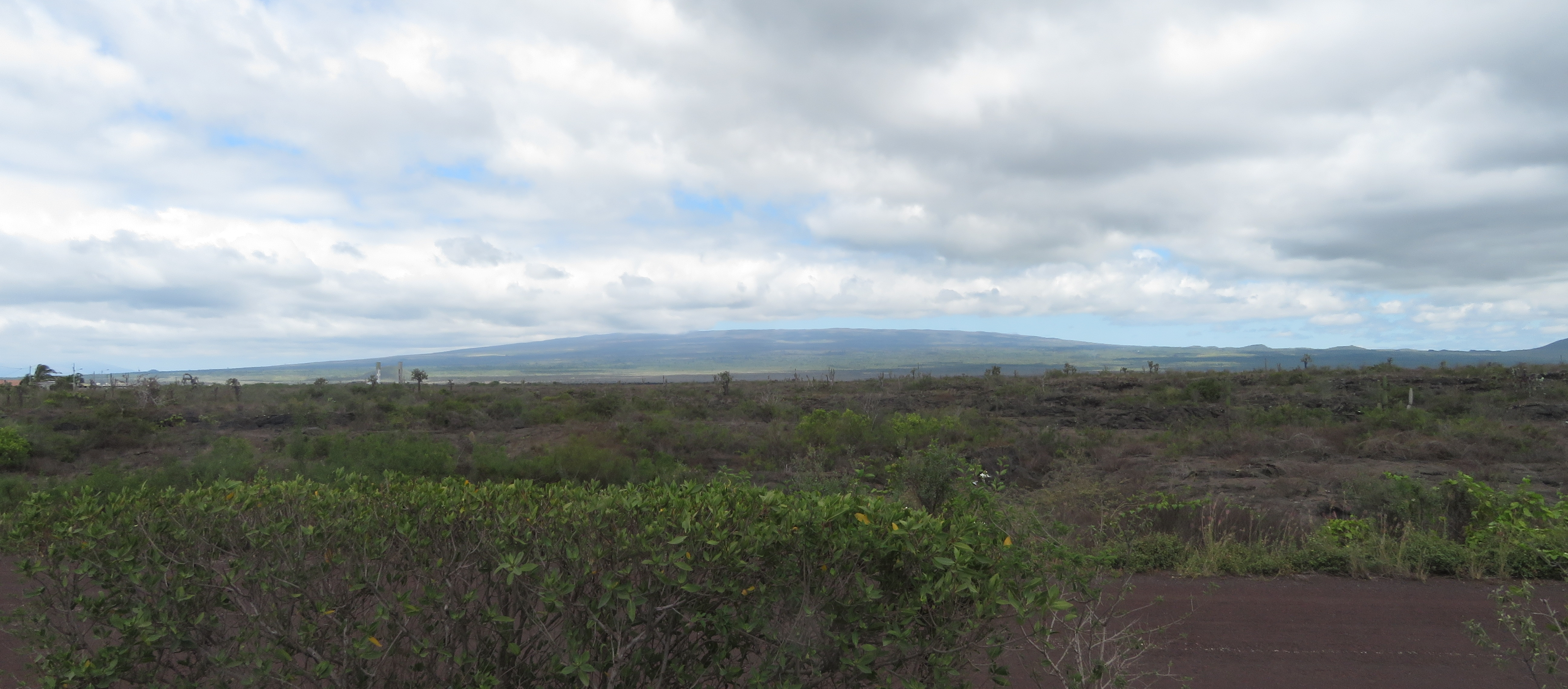 Vista de Puerto Villamil hasta la Sierra Negra, Isla Isabela, Islas Galápagos, Ecuador